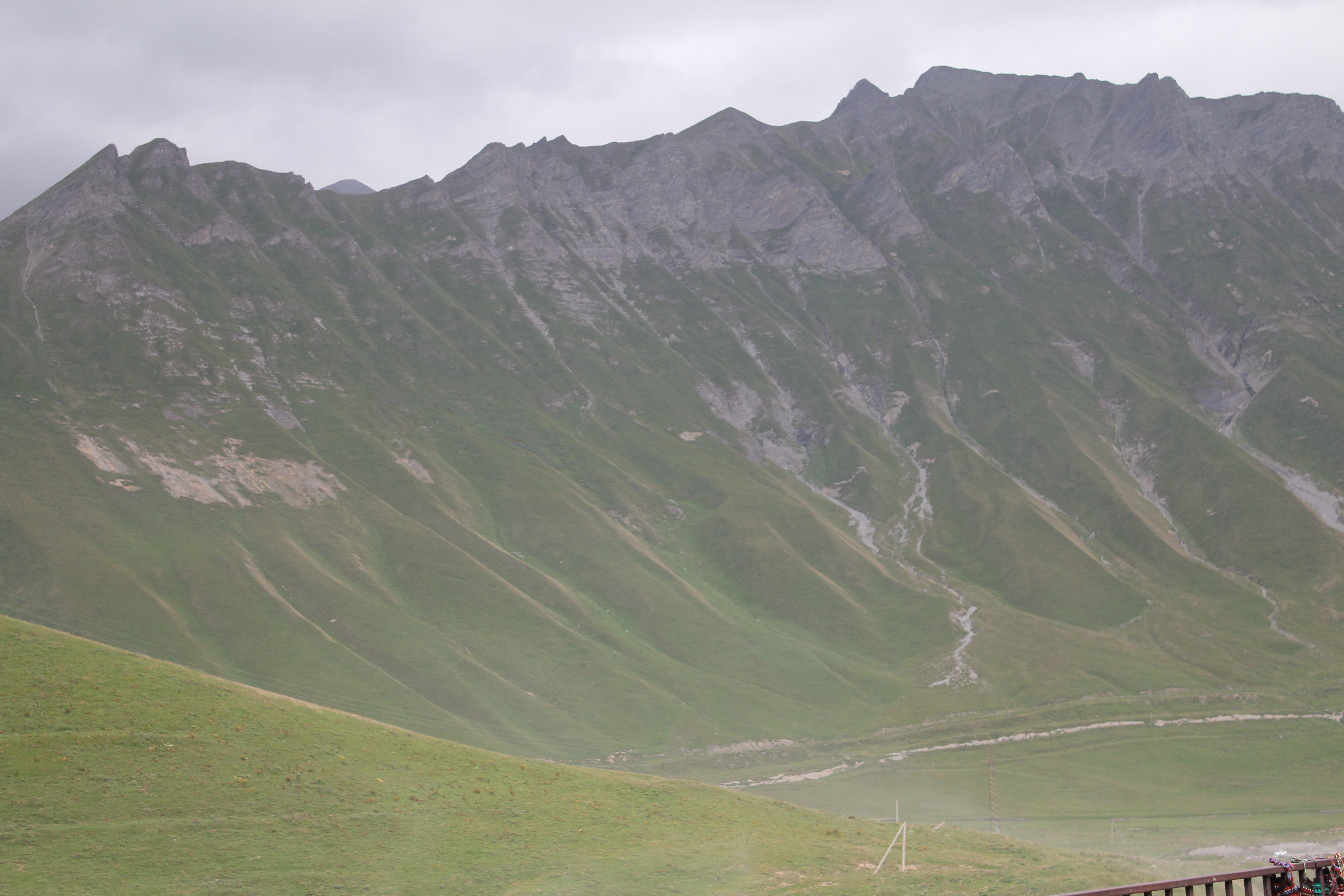 Главный Кавказский хребет, около перевала Крестовый